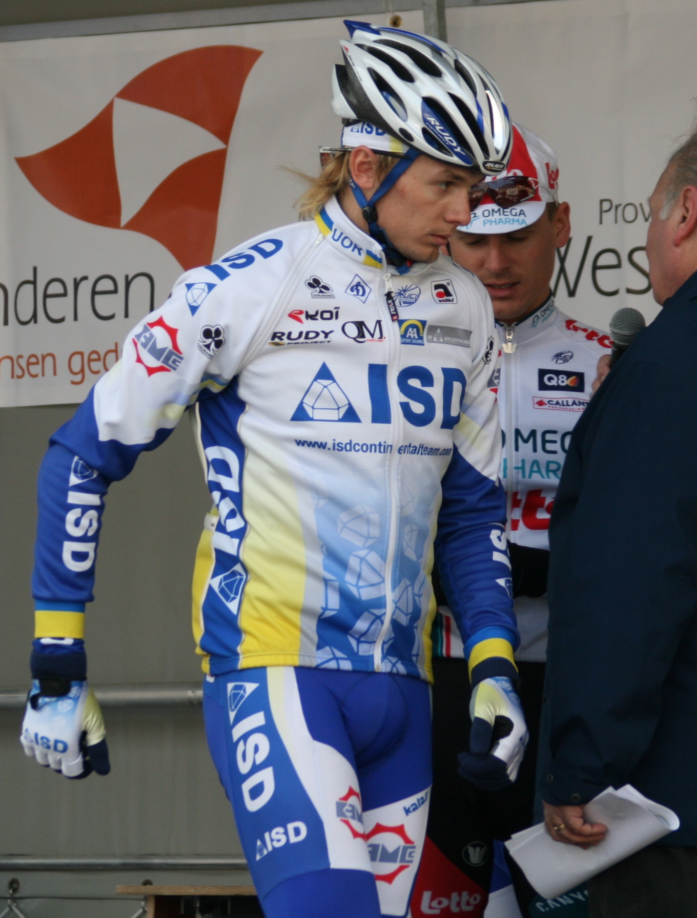 Yuriy Agarkov lors des Trois jours de Flandre occidentale 2010